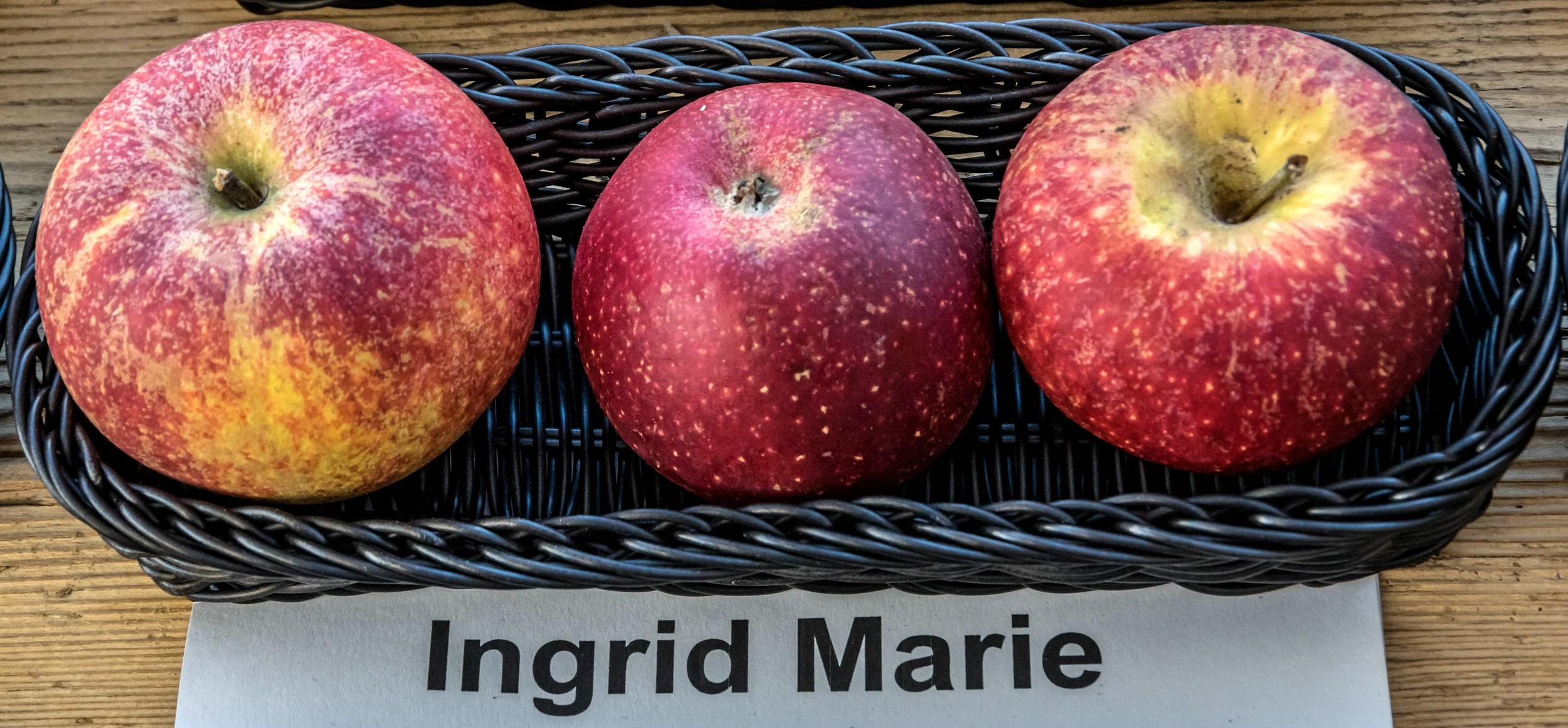 Alte Apfelsorten, von denen es im Badischen noch tragende Bäume gibt. Alle Aufnahmen au dem Oktober 2015